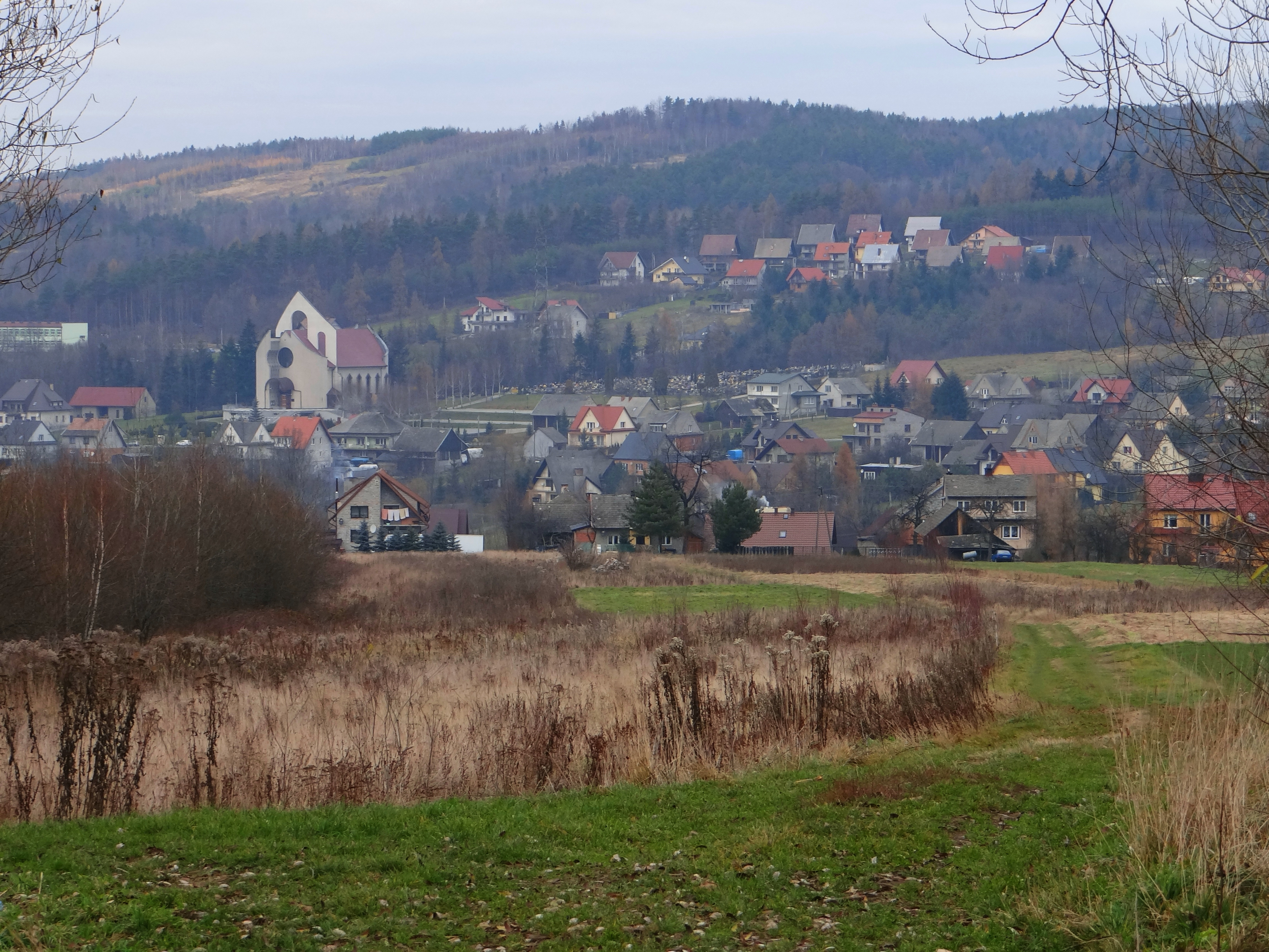 Rudnik w gminie Sułkowice